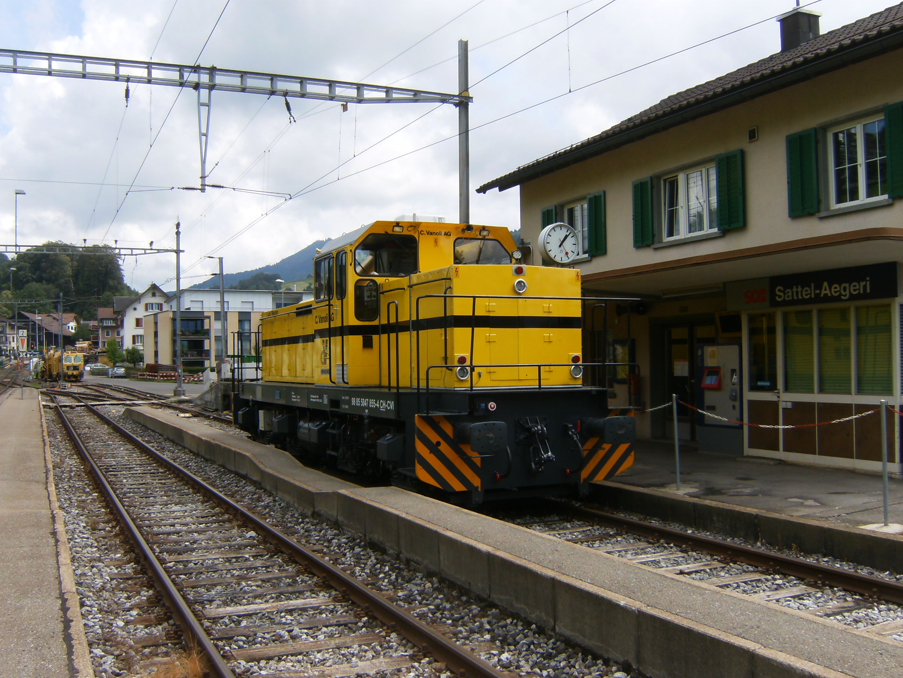 C. Vanoli AG, Bhf Sattel-Aegeri SZ